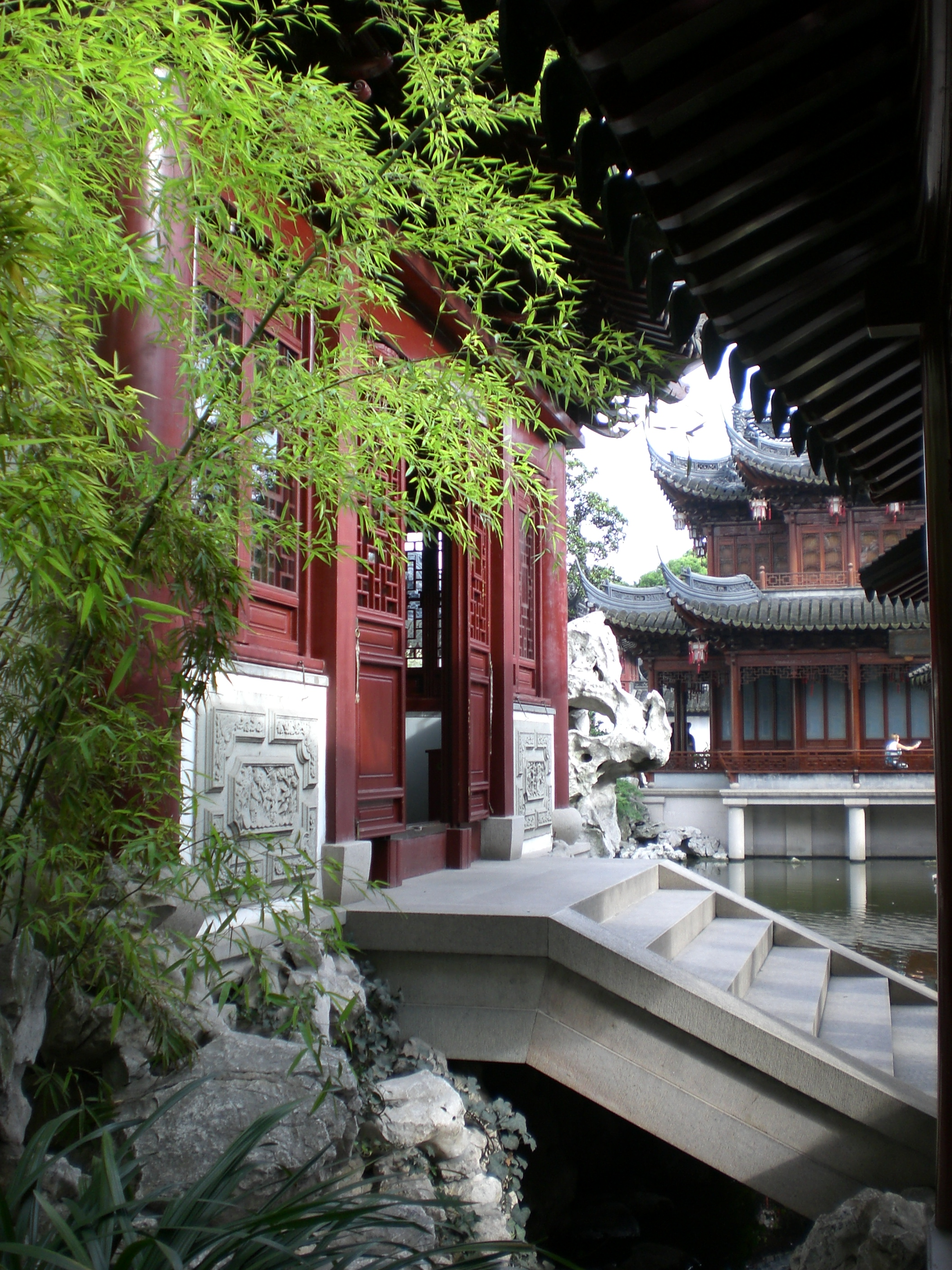 Shanghai, Giardino del Mandarino Yu, XVI secolo.